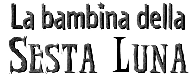 Logo italiano della serie di libri "La bambina della Sesta Luna"